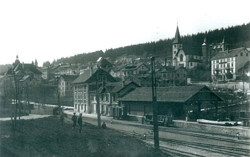 Bahnhof Tramelan der meterspurigen Tavannnes-Tramelan-Bahn (TT) und der Tramelan-Breuxleux-Noirmont-Bahn (TBN)